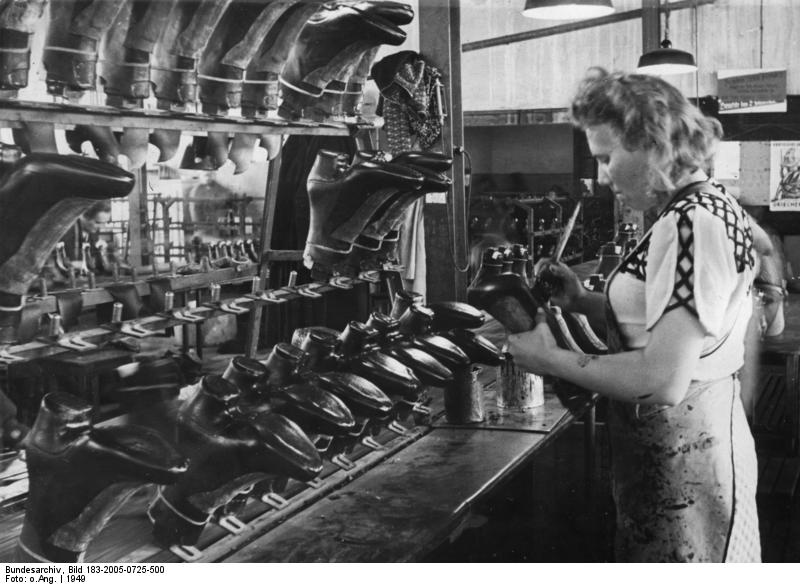 Piesteritz, Gummiwerk "Elbe" Gummiwerk "Elbe" Piesteritz. 1949 Die Gummiüberschuhe werden am laufenden Band hergestellt. U.B.z.: Das Einstreichen der Sohlenflächen, auf die die Sohlen aufgeklebt werden. Aufn.: Illus-Fifo 3653-49